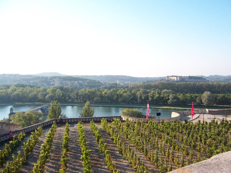 Vignoble du rocher des Doms à Avignon